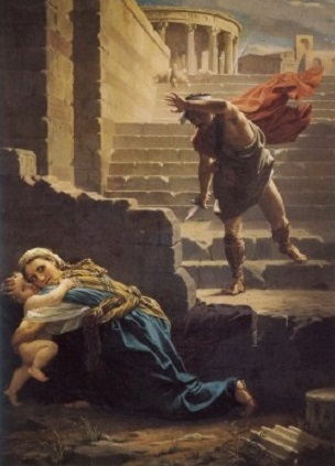 "La strage degli innocenti", olio su tela, 100.4 x 75 cm., Museo Cassioli, Asciano